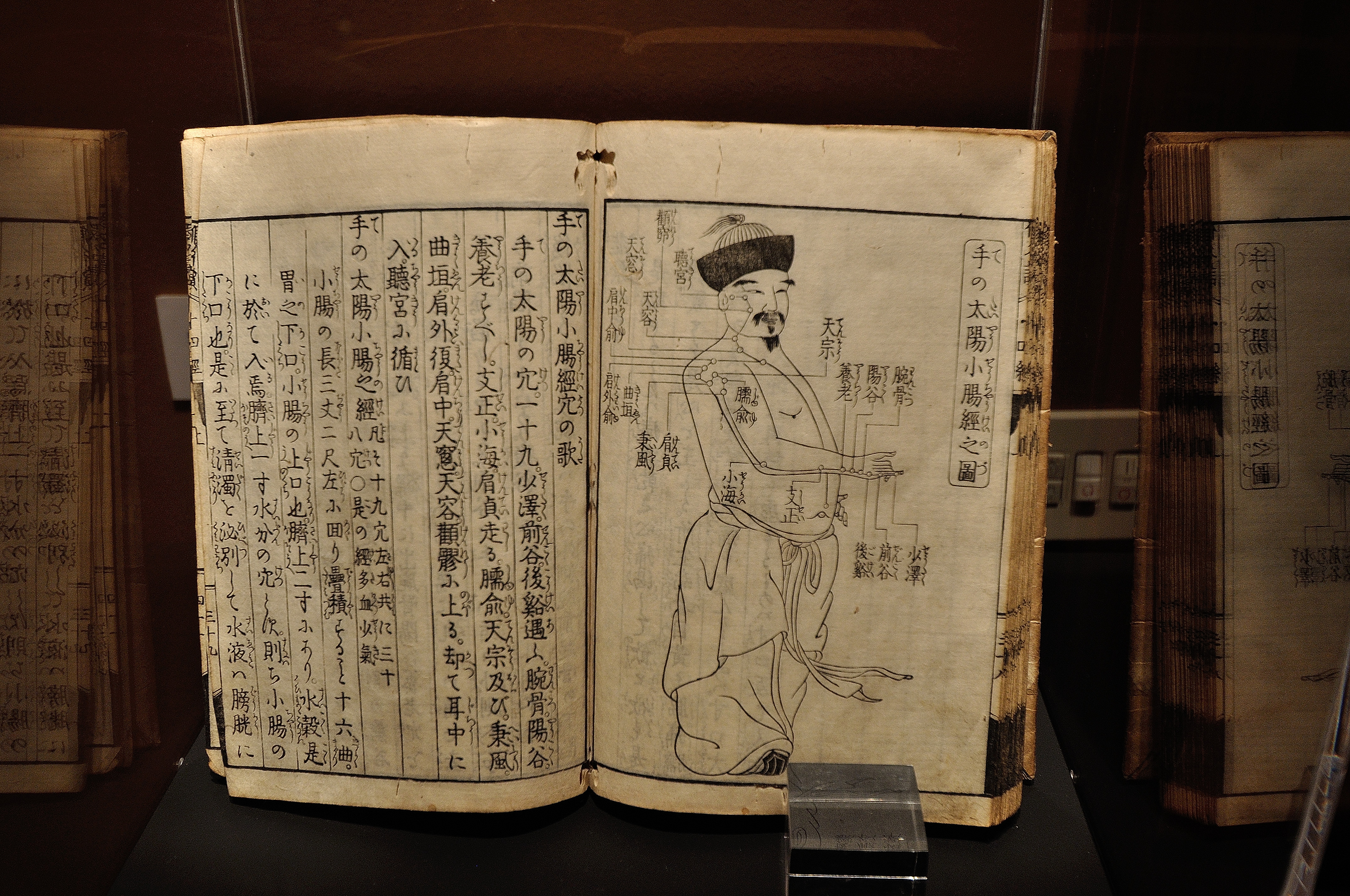 Museo delle culture del mondo This is a photo of a monument which is part of cultural heritage of Italy.